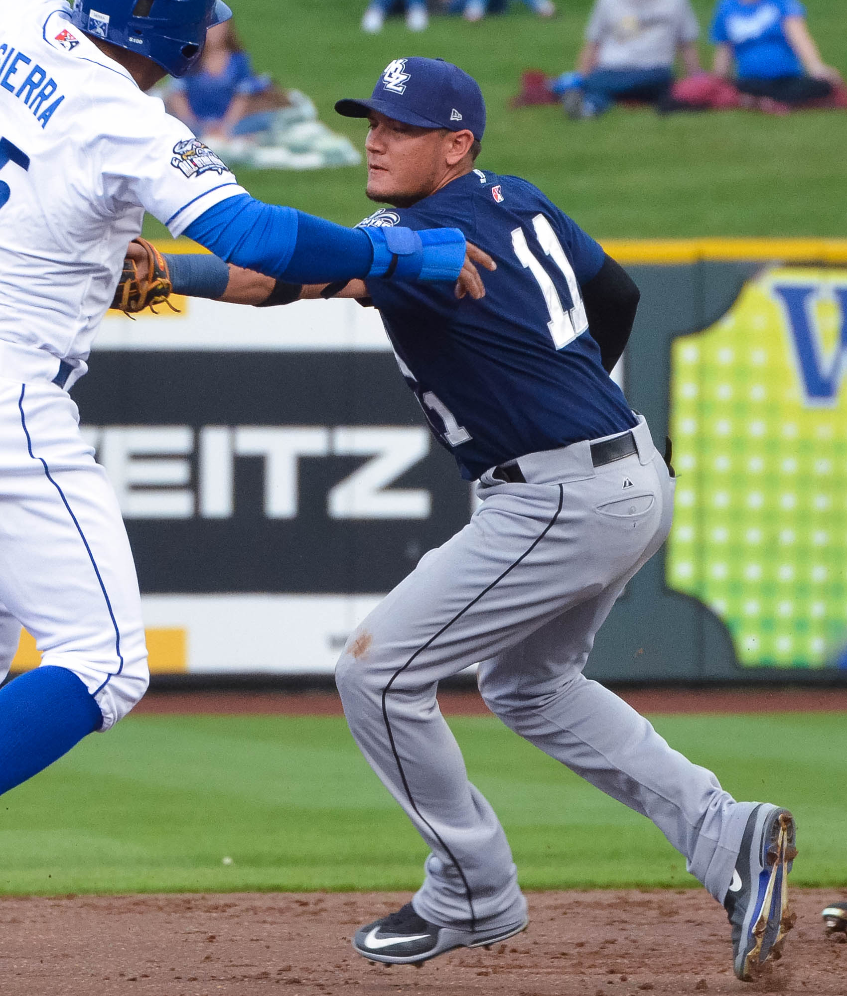 Miguel Rojas